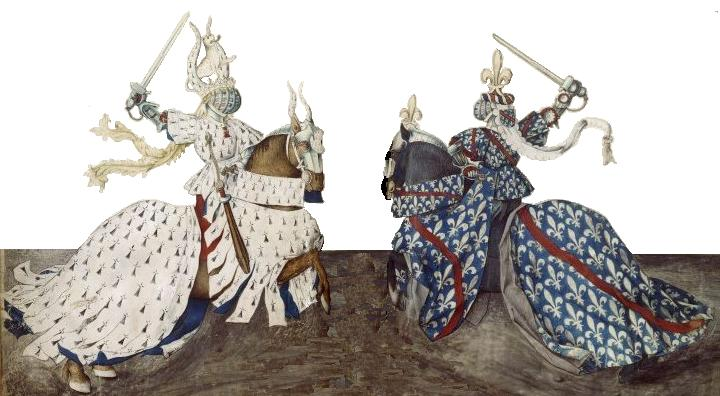 "digital restoration" of an illustration from King René's Tournament Book. Deze middeleeuwse illustratie uit de veertiende eeuw werd door mij uitgebreid digitaal gerestaureerd. Dat was nodig omdat beide hertogen zich op twee verschillende tegenoverliggende perkamenten bladzijden van een opengeslagen boek bevonden. De kloof en de perspectivische vertekening die daaruit voorkomen heb ik gecorrigeerd zodat de beide hertogen, herkenbaar aan het witte " vair" of hermelijn van Bretagne en de schuine rode balk op de Franse lelies van de Hertog van Bourbon weer op één en hetzelfde vlak vechten. De ondergrond is aangevuld, de sterk verkleurde achtergrond is voor de duidelijkheid wit gemaakt door de figuren " uit te knippen". Robert Prummel 2006